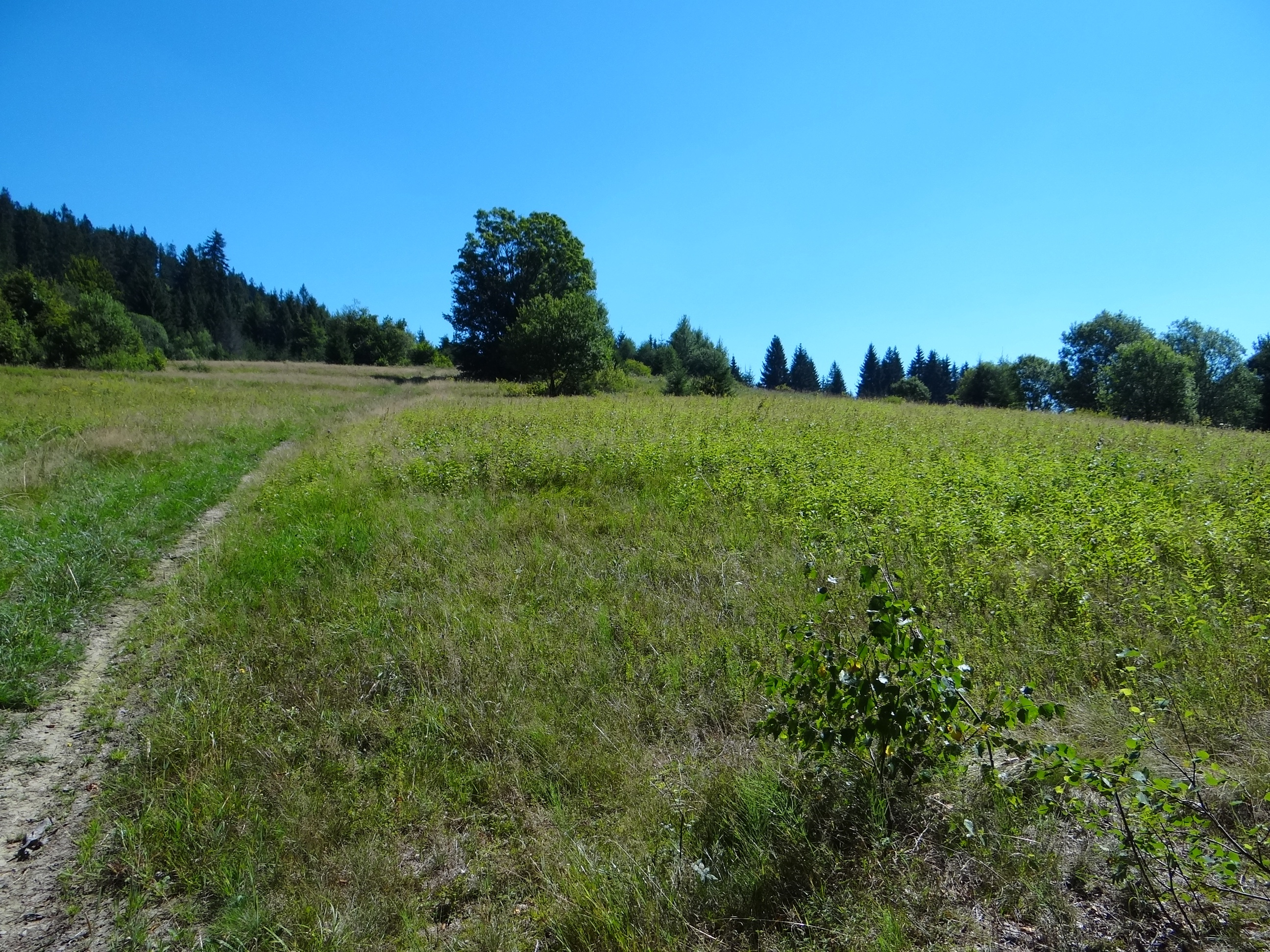 Polana Pokrzywnianka w Glince